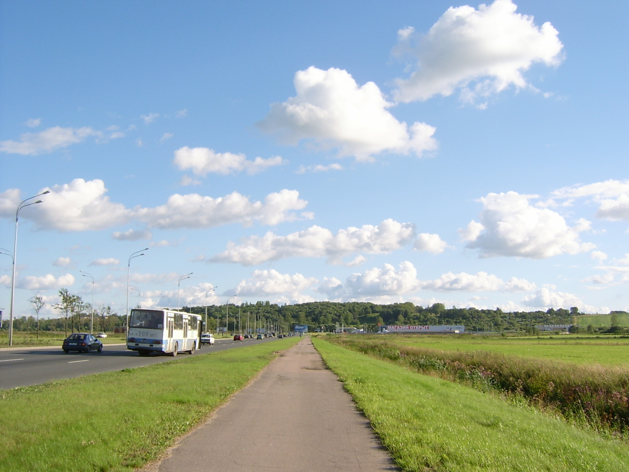 Пулковская гора